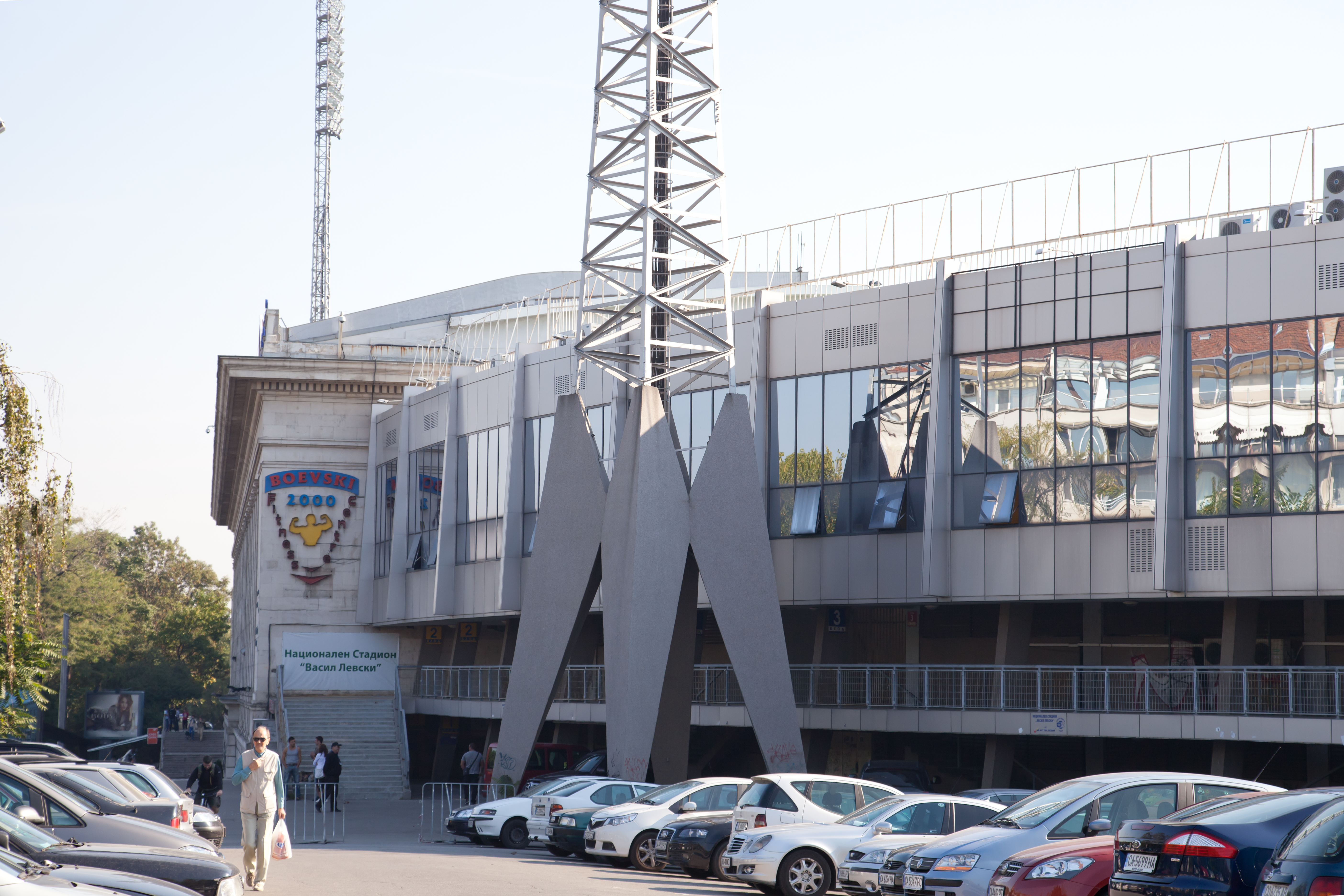 Wassil-Lewski-Nationalstadion; Sofia, Bulgarien